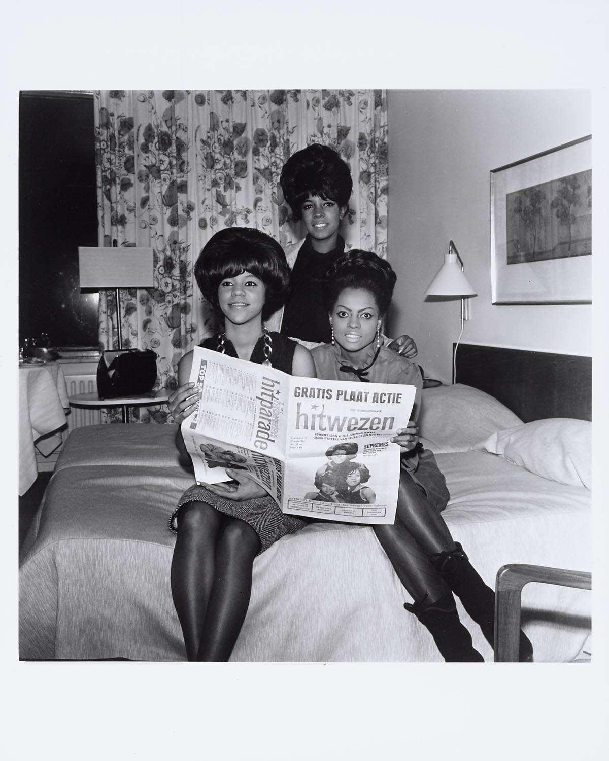 The Supremes met een exemplaar van het tijdschrift Hitwezen in het Hilton Hotel, 14 oktober 1964 Foto Ben van Meerendonk / AHF, collectie IISG, Amsterdam